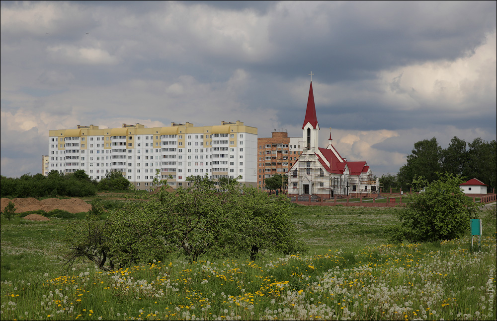 Мінск 2015. Мікрараён і касцёл Святога Духа